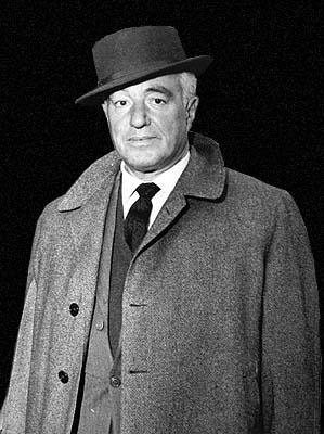 Il celebre attore e regista italiano Vittorio De Sica.